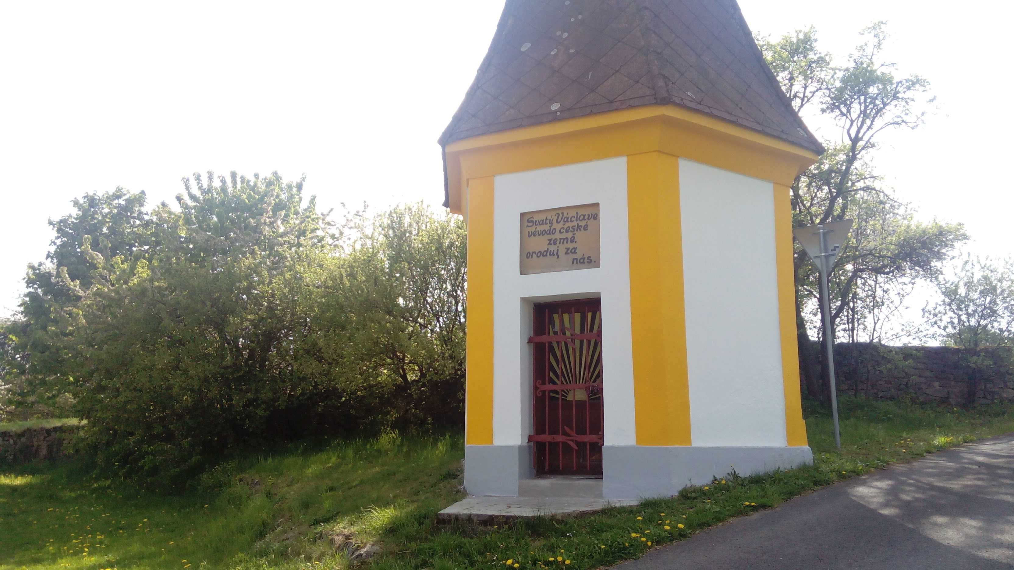 Kaplička v Soběsukách u Nepomuka.